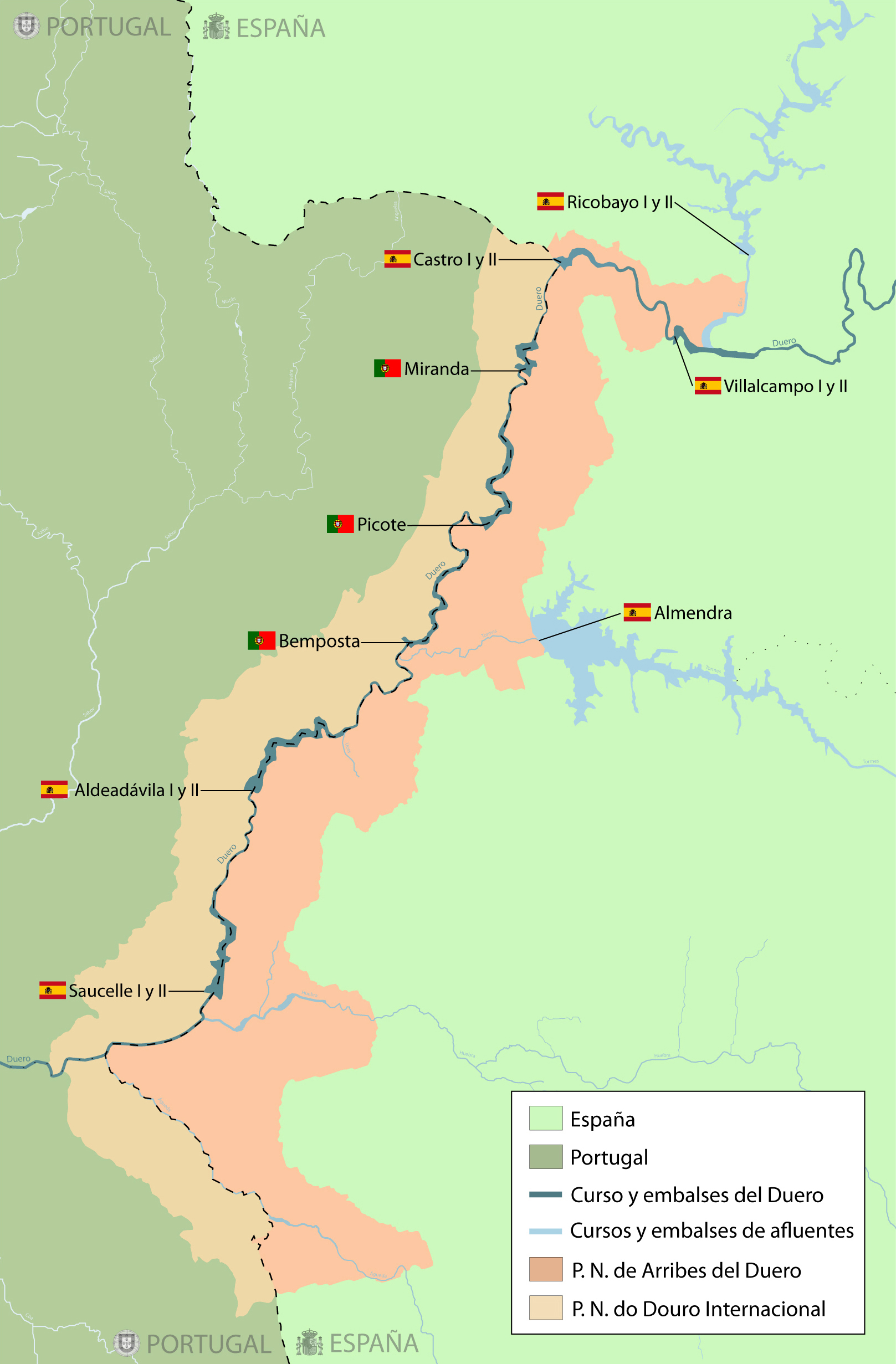 Mapa de los Saltos del Duero junto con las presas portuguesas de este tramo del Duero